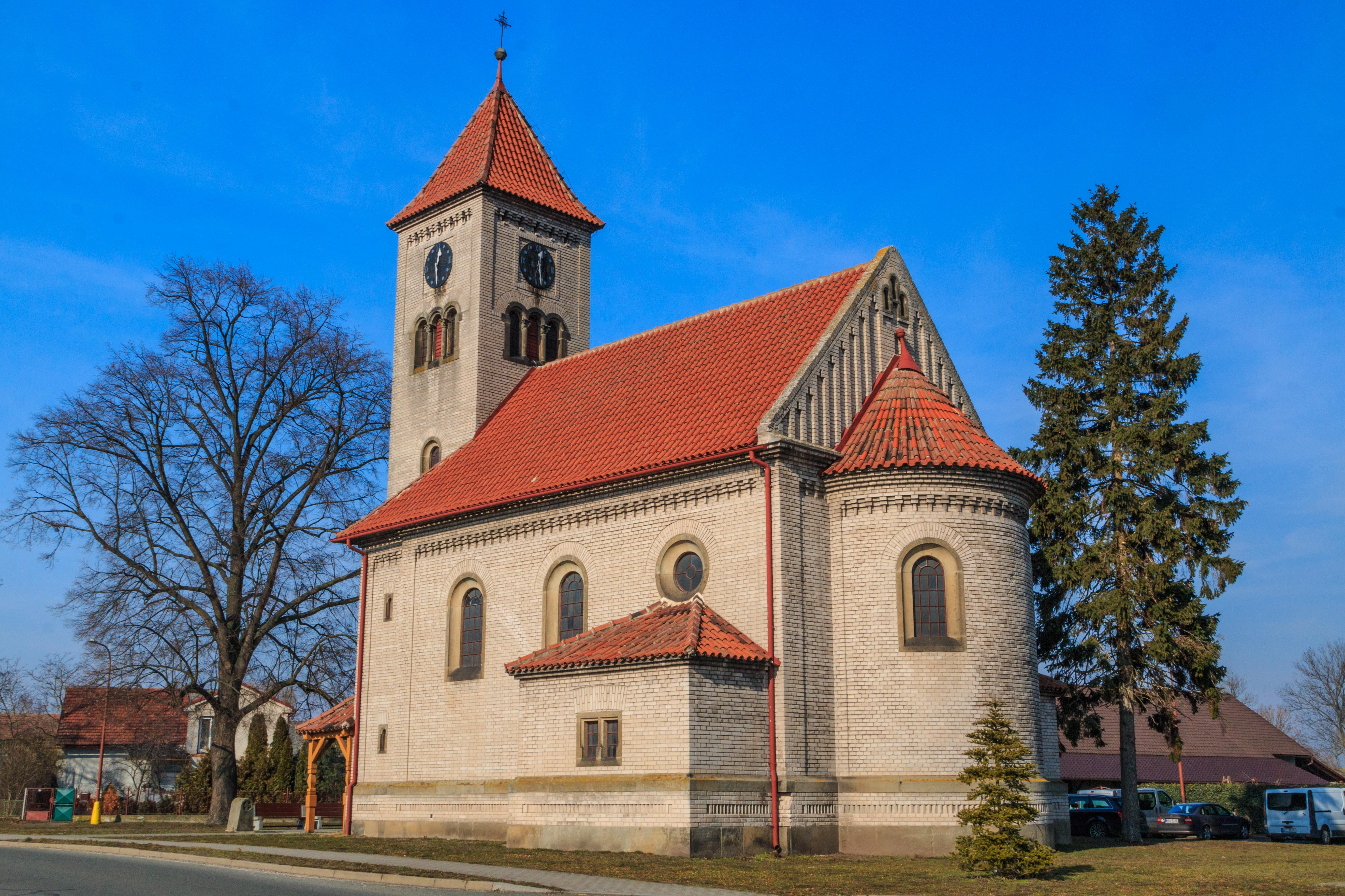 kostel svatého Vojtěcha v Dolanech